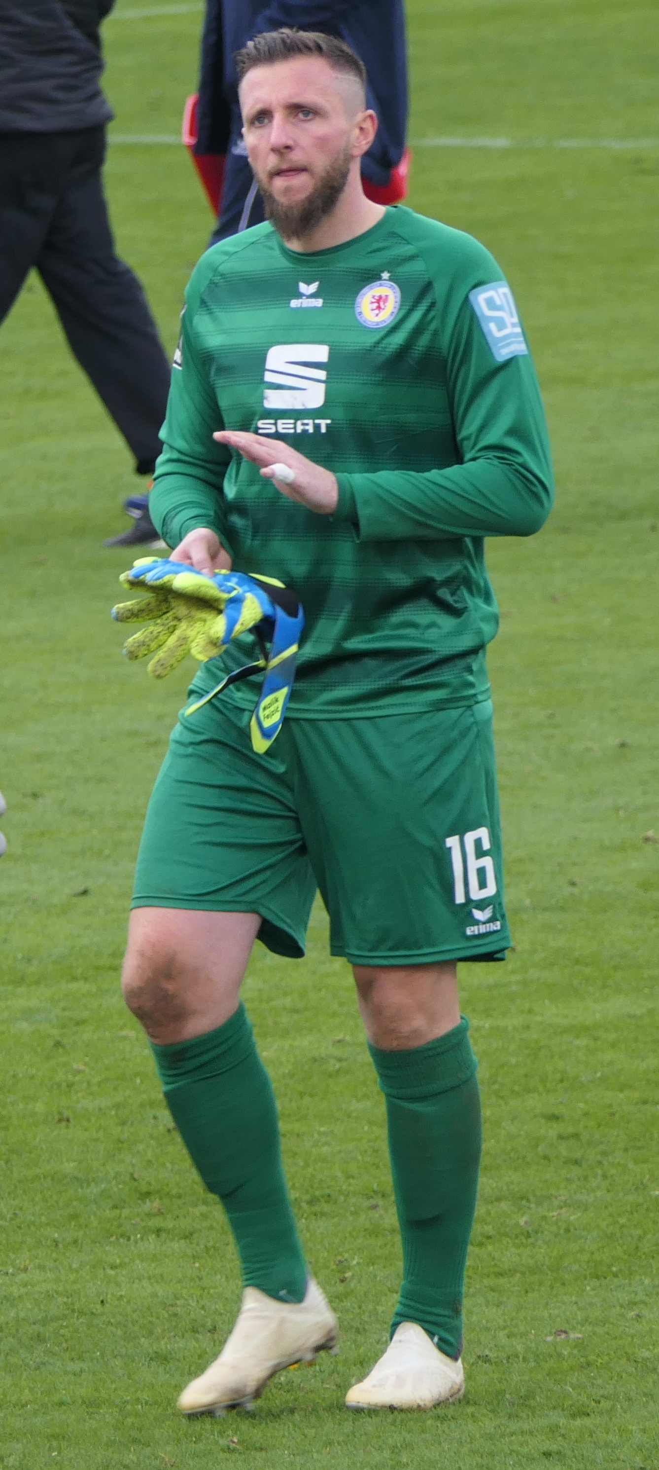 Der Fussballprofi Jasmin Fejzic im Trikot von Eintracht Braunschweig beim Auswärtsspiel gegen den TSV 1860 München am 26.01.2020.